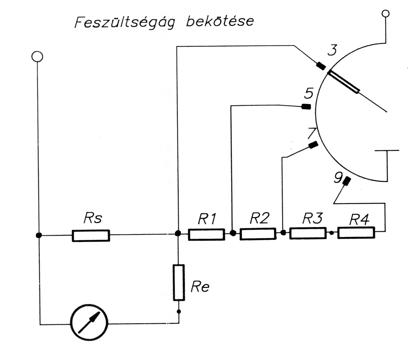 Söntellenállás elhelyezése a feszültség ágban